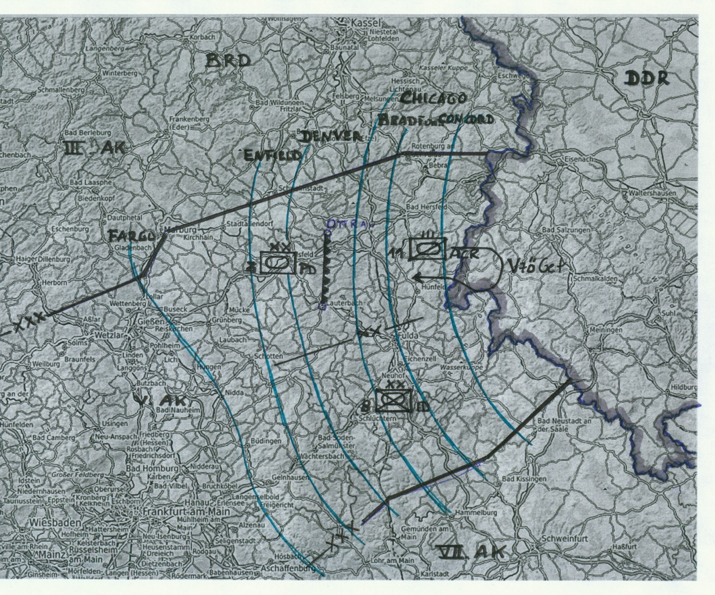 Skizze Gefechtstreifen V. US-Korps mit Führungslininen CONCORD - FARGO